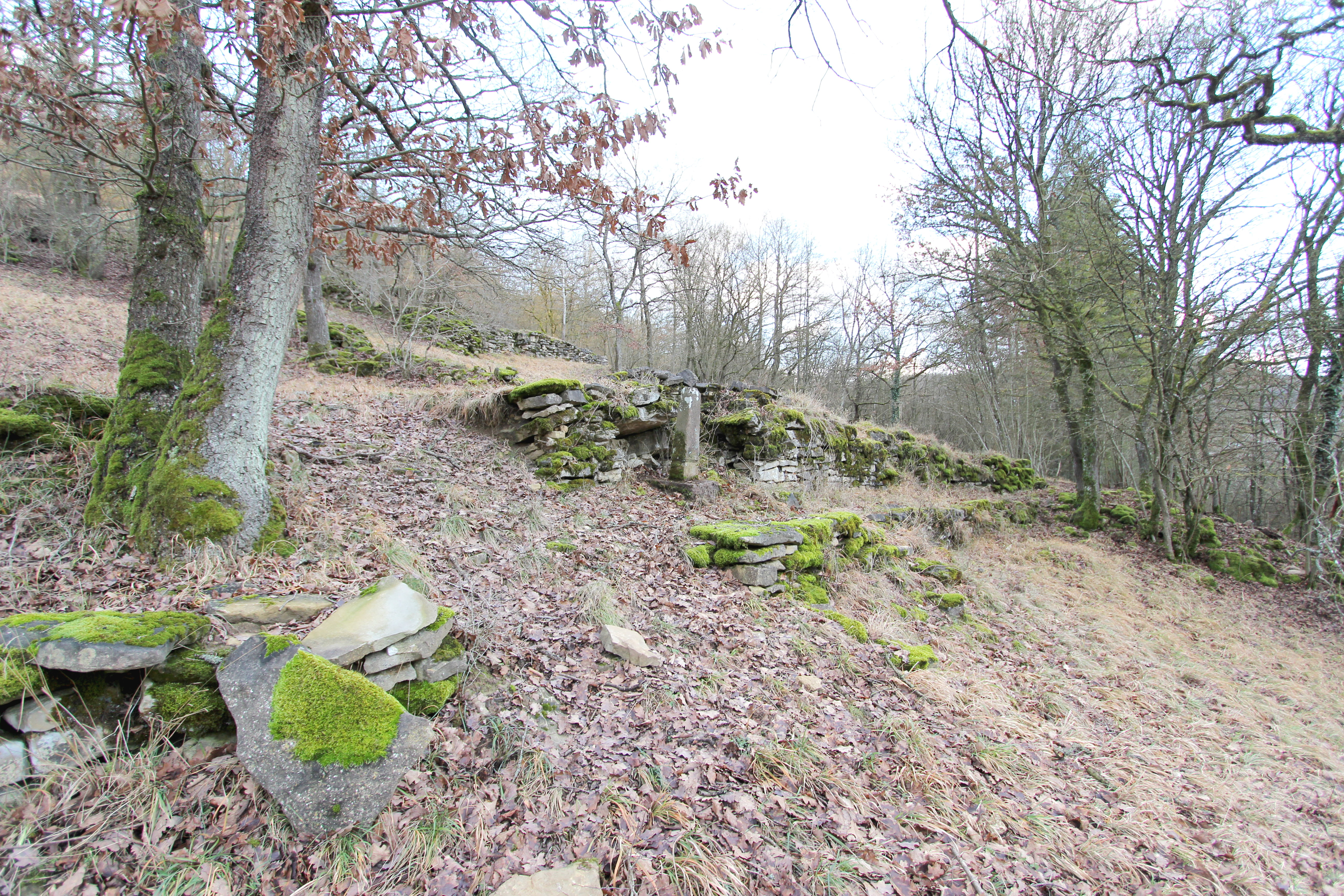 54636 Hüttingen an der Kyll, In der Held. Am 7. Juni 1995 wurden das Naturschutzgebiet In der Held bei Hüttingen mit der Nummer NSG-7232-077 ausgewiesen. Kalkmagerrasens mit seltenen Orchideen (z.B. Ophrys holoserica, Himantoglossum hircinum), Tagfalterarten sowie Reptilien. Trockengebüsche mit ebenfalls seltenen Arten. Eine Schafbeweidung findet statt. Aufnahme von 2017.